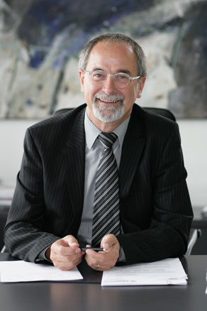 Helmut Stahl, Fraktionsvorsitzender der CDU-Landtagsfraktion